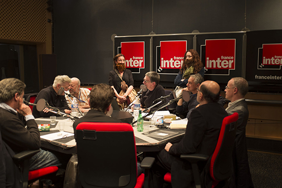 Action du groupe féministe La Barbe en direct sur l'antenne de France Inter - émission 3D - Paris, dimanche 4 mai 2014, 12 h 20.